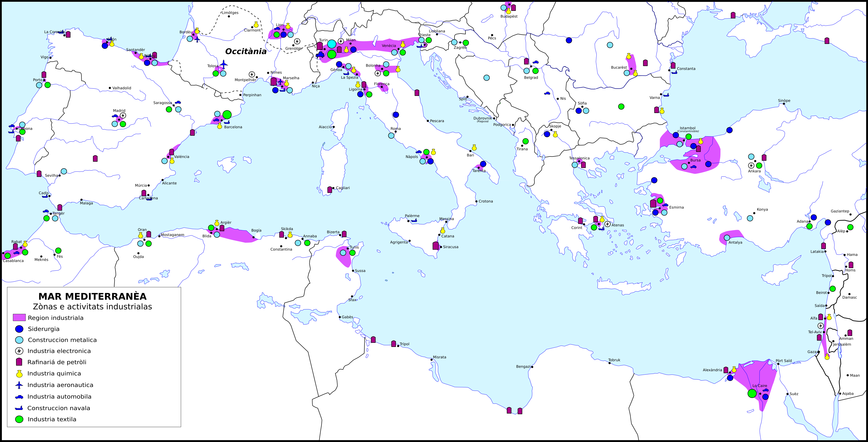 Zònas e activitats industrialas dau Bacin Mediterranèu.